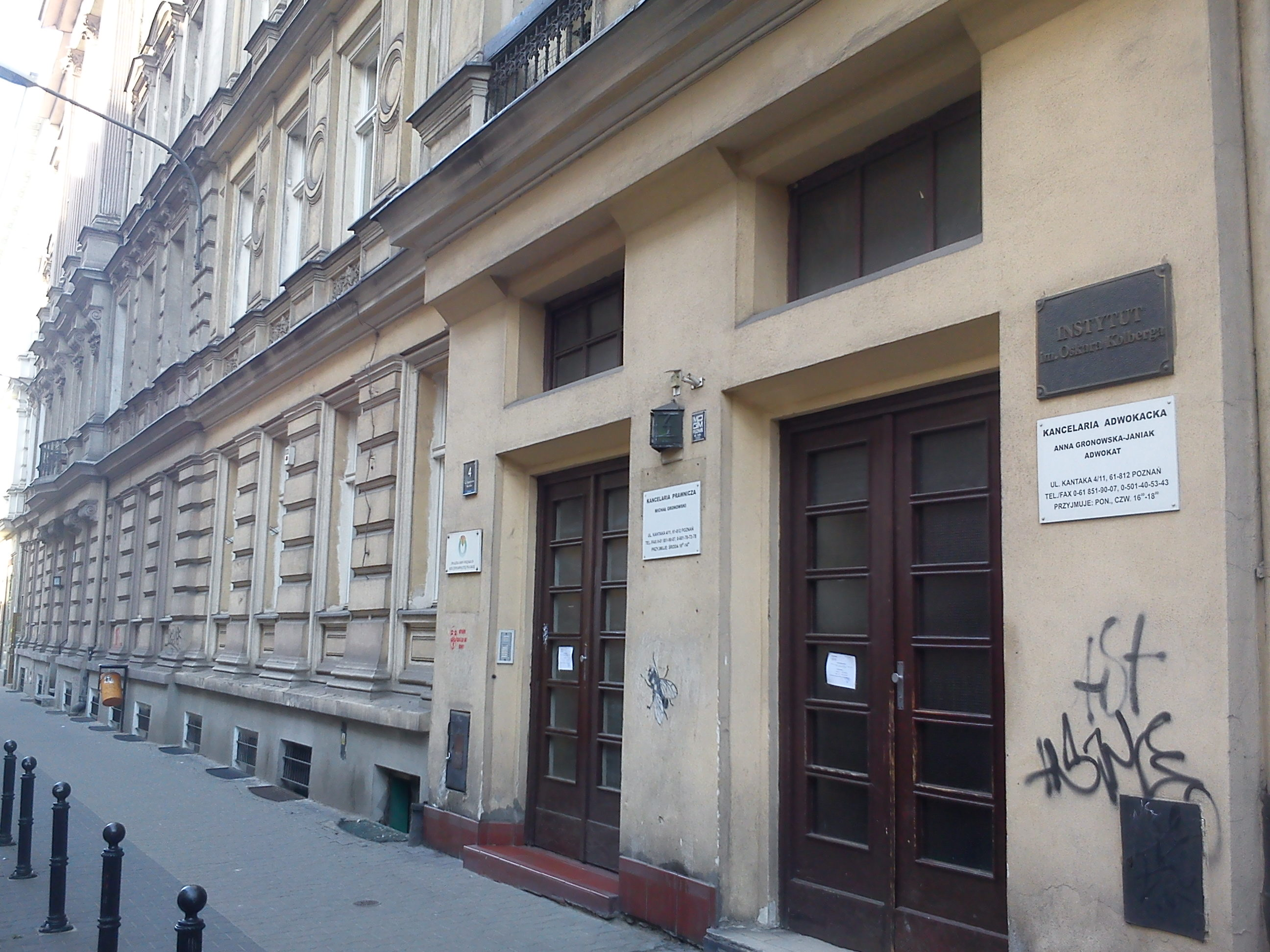 Poznań, ul. Kantaka 4 (Instytut im. Oskara Kolberga).